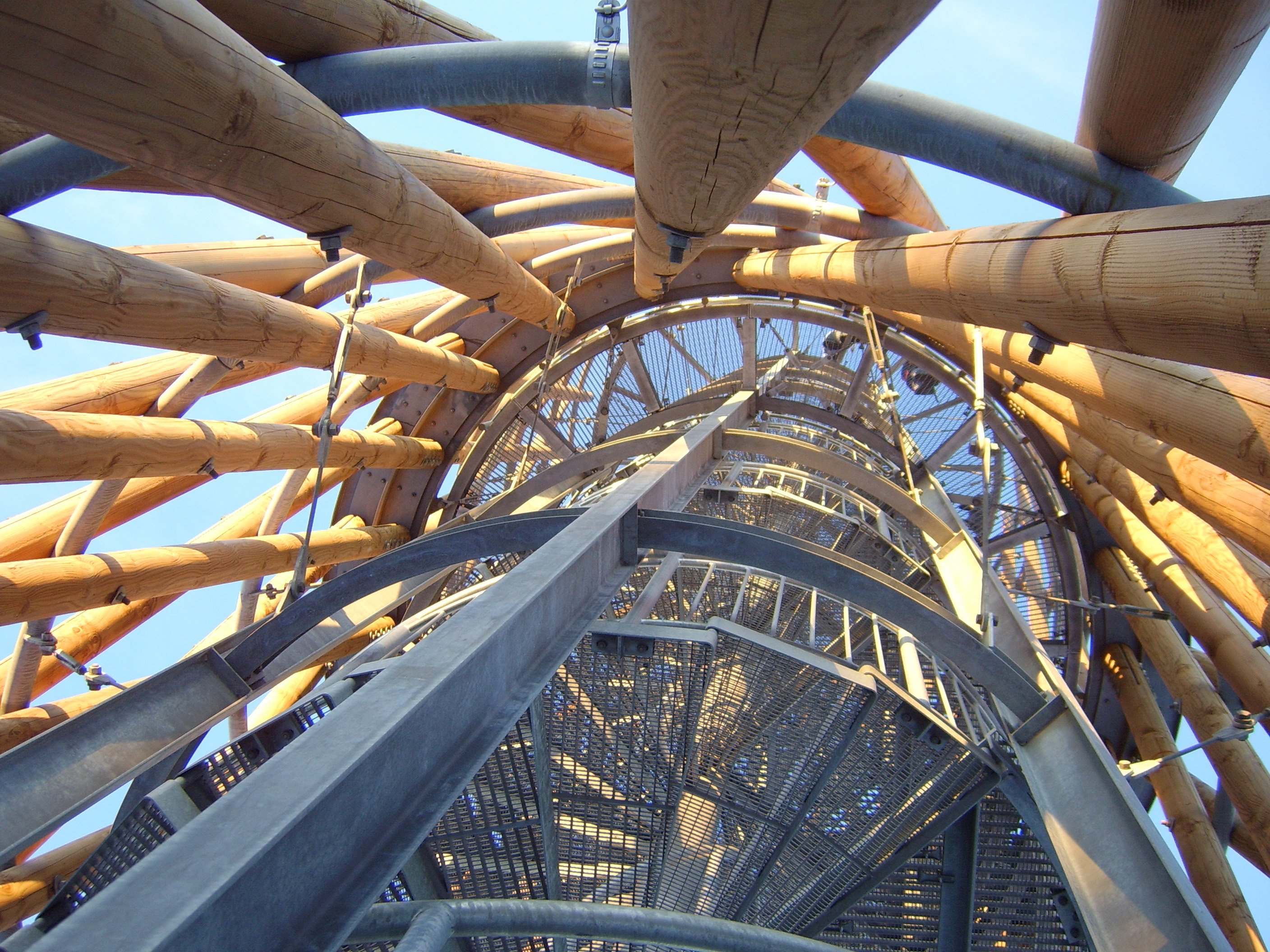 Der Lörmecke Turm im Arnsberger Wald nahe Meschede. Konstruktion des Turms. Sicht von unten nach oben.